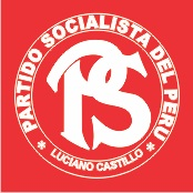 Se retoco a la actualidad y fecha de publicación